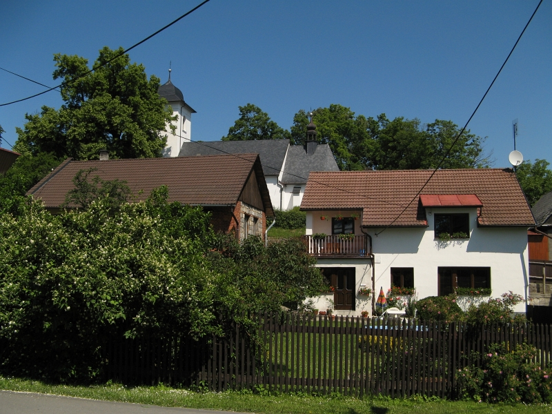 Kostel sv. Jakuba Staršího (Spálov), Spálov